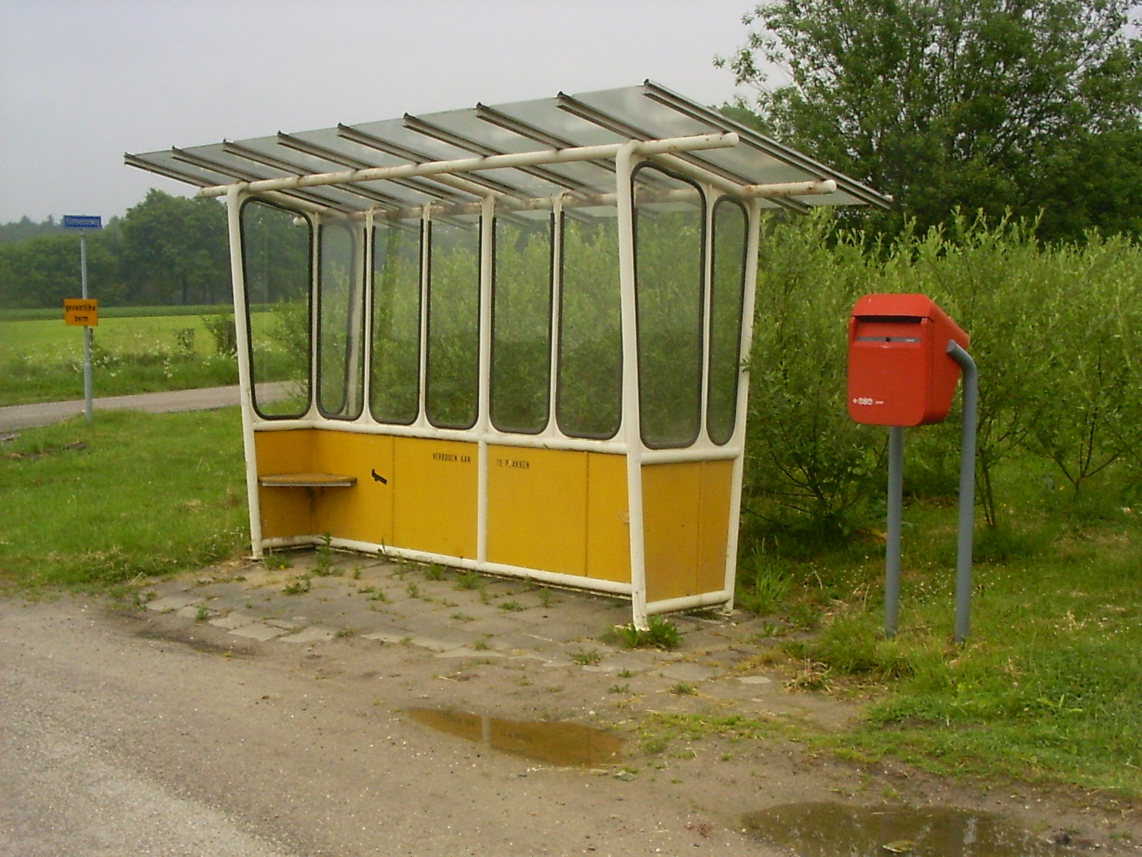 Rekken (nl), bushalte en brievenbus bij Oldenkotte